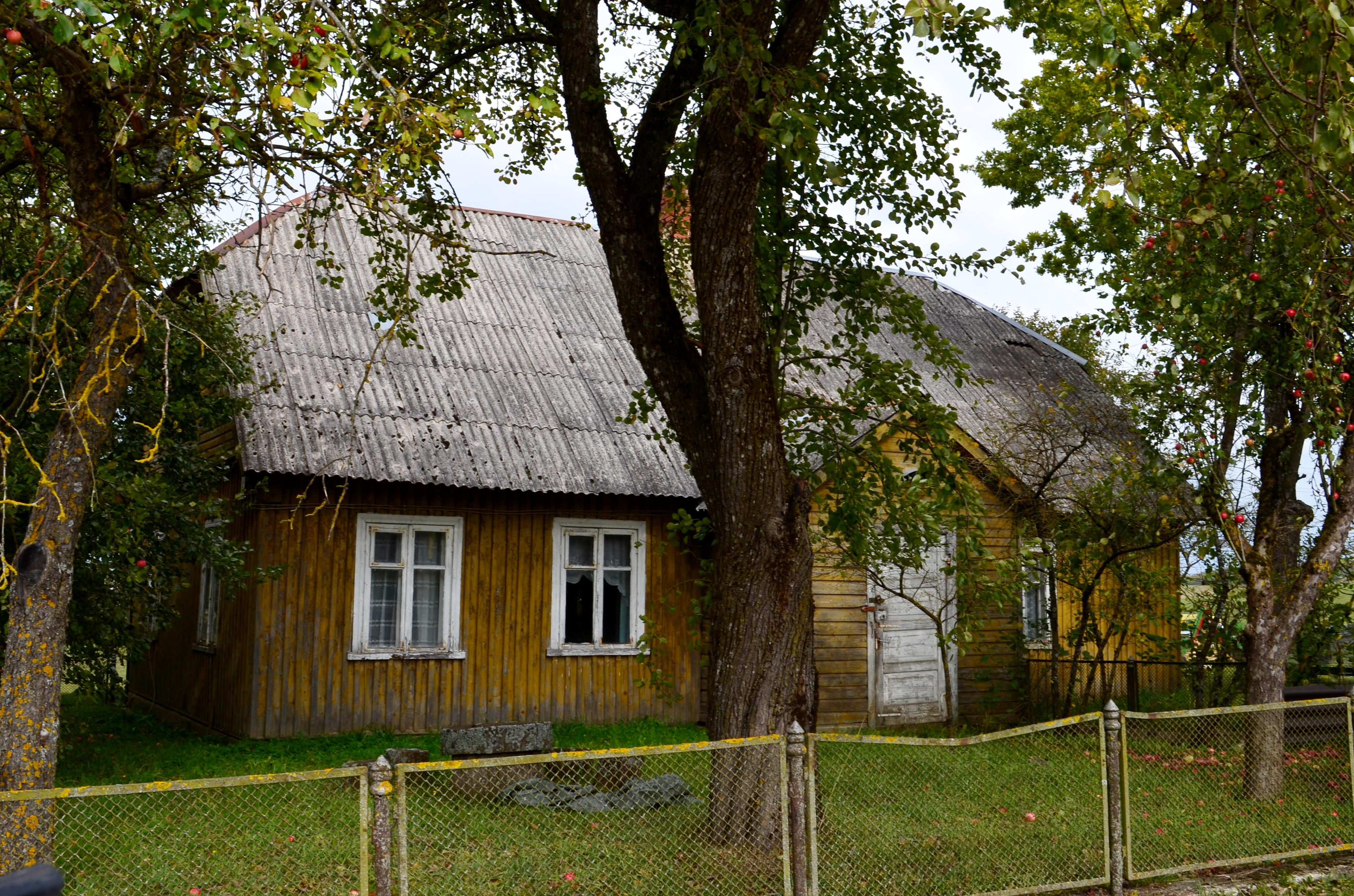 Kęsai, Telšių raj.